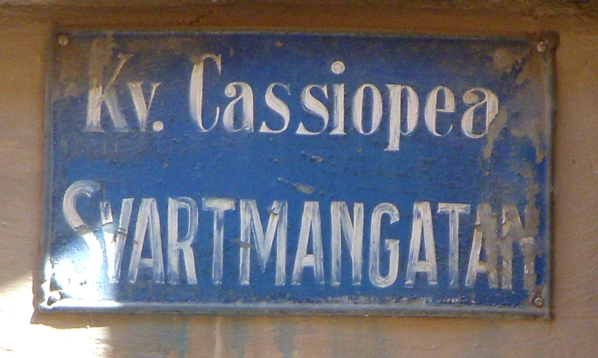 äldre gatuskylt i Stockholm